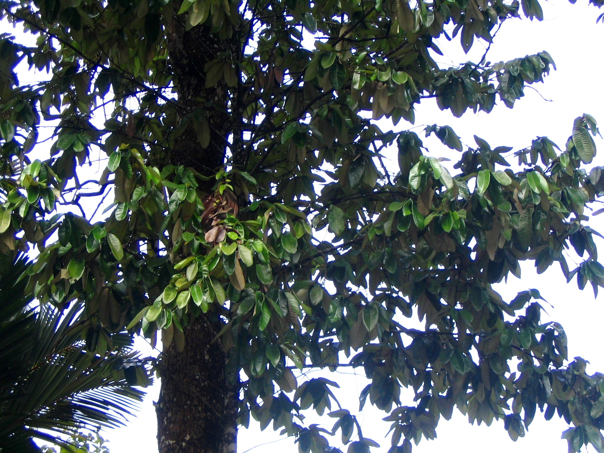 Upuna bornensis - Feuillages - Forest research institute Malyasia